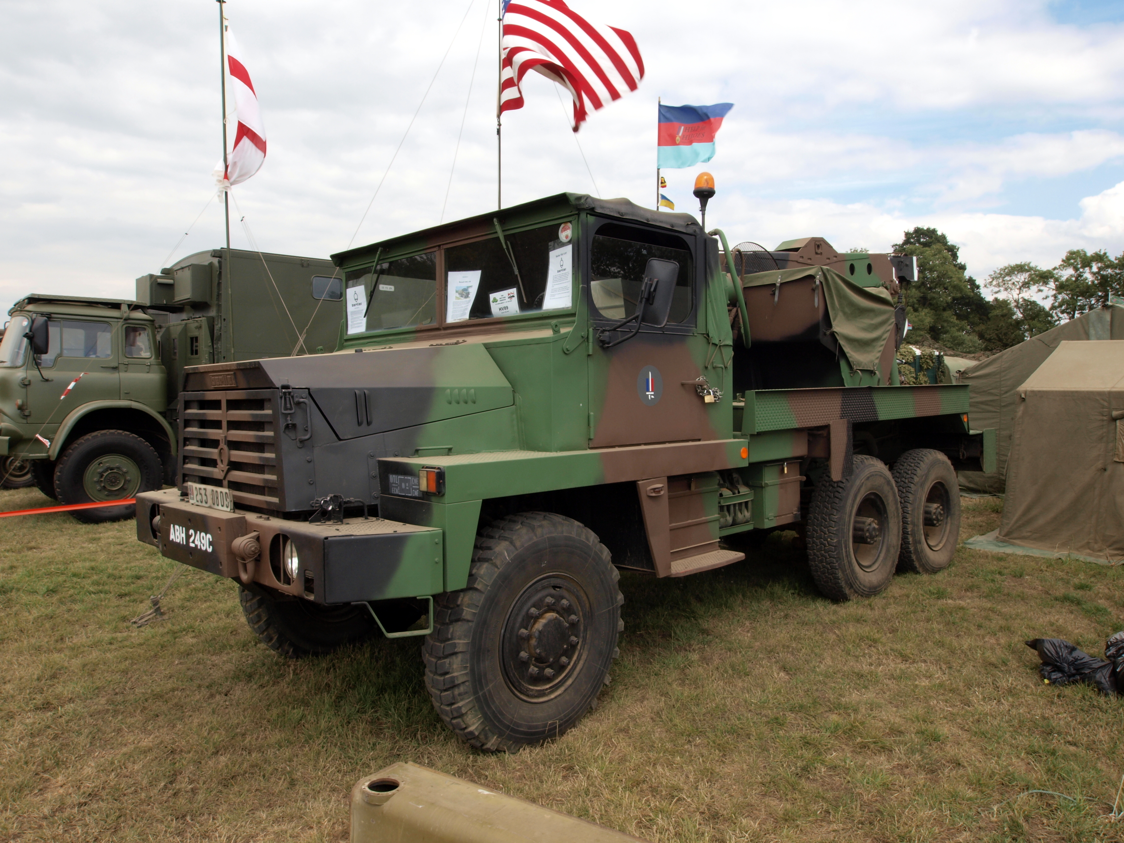 Berliet TBC 8kt military wrecker.